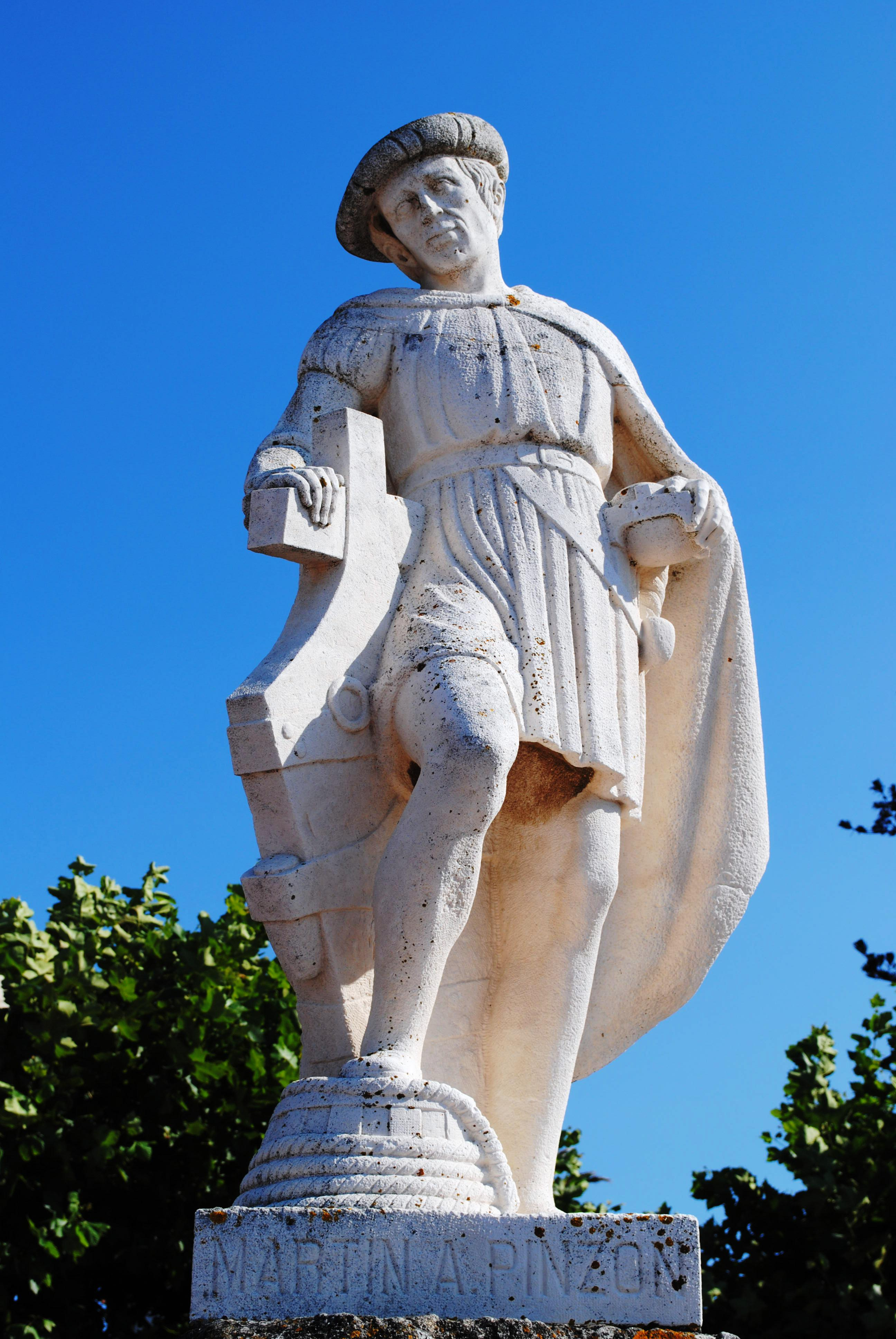 Escultura en Baiona, feita por Antonio León Ortega en 1977, copia dunha feita por Antonio Pinto Soldán para a Exposición Iberoamericana de Sevilla de 1929, trasladada en 1945 a Palos de la Frontera.